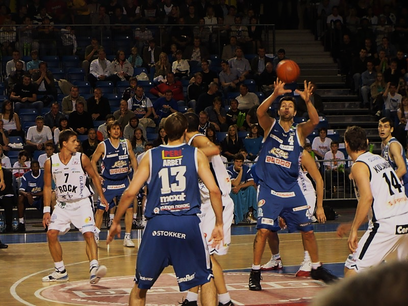 Korvpalli Meistriliiga 2007/2008 hooaja viimane finaalmäng Saku Suurhallis.